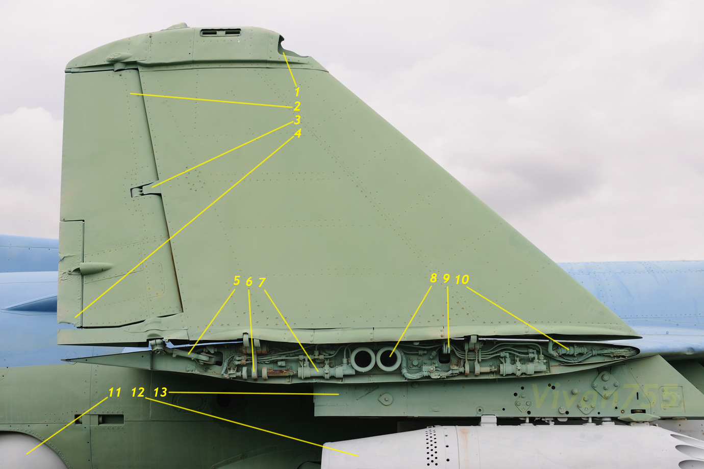 Сложенное крыло палубного штурмовика Як-38.1 — место установки АНО, 2 — элерон, 3 — узел навески элерона, 4 — триммер, 5 — тяга управления элероном, 6 — замок крыла, 7 — гидроцилиндр замка, 8 — топливопровод, 9 — тяга подъёма крыла, 10 — разъём электропроводки, 11 — сопло двигателя, 12 — пусковая установка НУРС, 13 — узел подвески вооружения